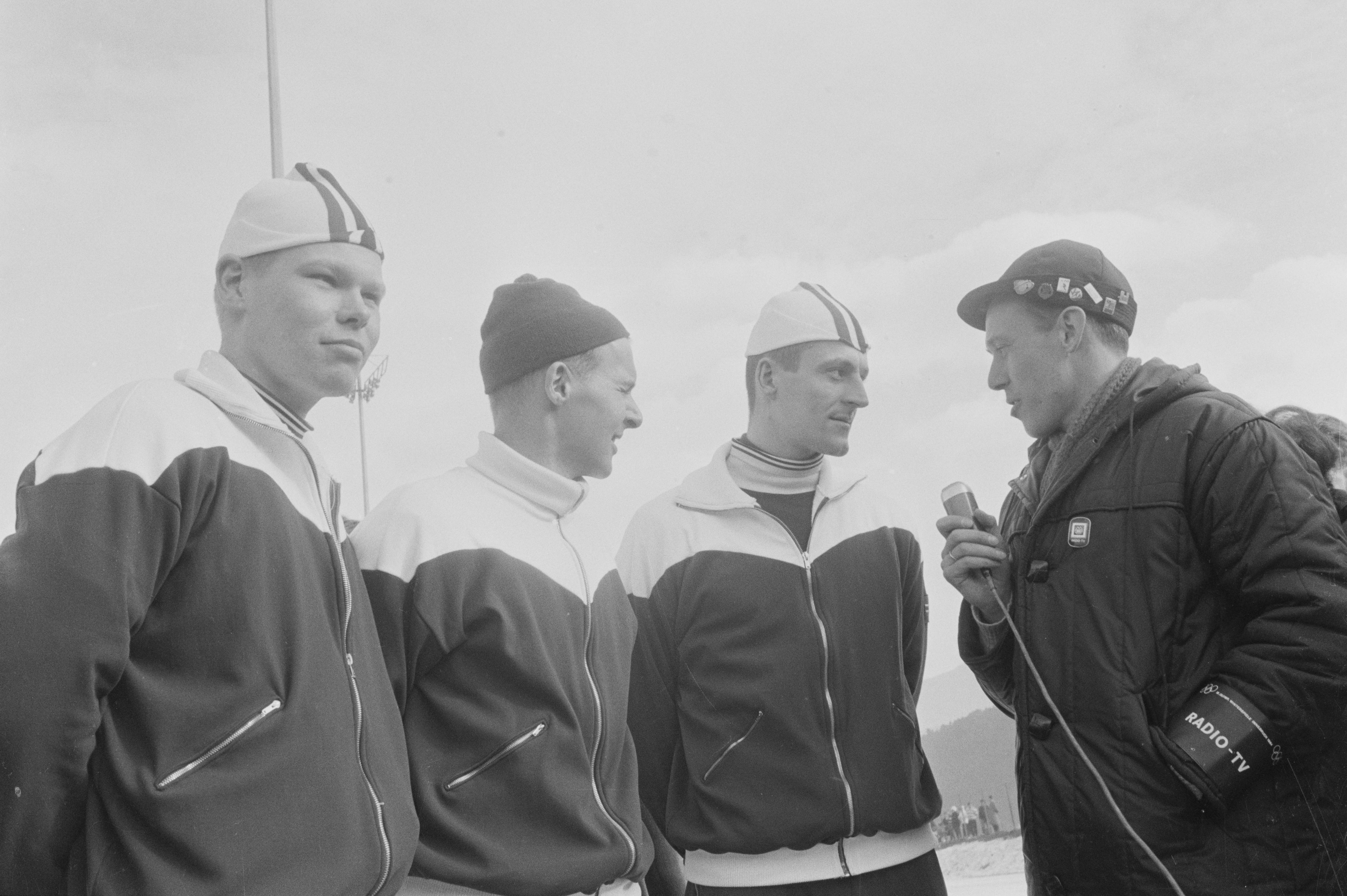 Bildet er hentet fra Arkivverket. OL Innsbruck 1964 500m skøyter Gull Arkivinstitusjon : Riksarkivet Arkivnavn : Billedbladet NÅ Sted : Østerrike, Tirol, Innsbruck, Innsbruck Avbildet